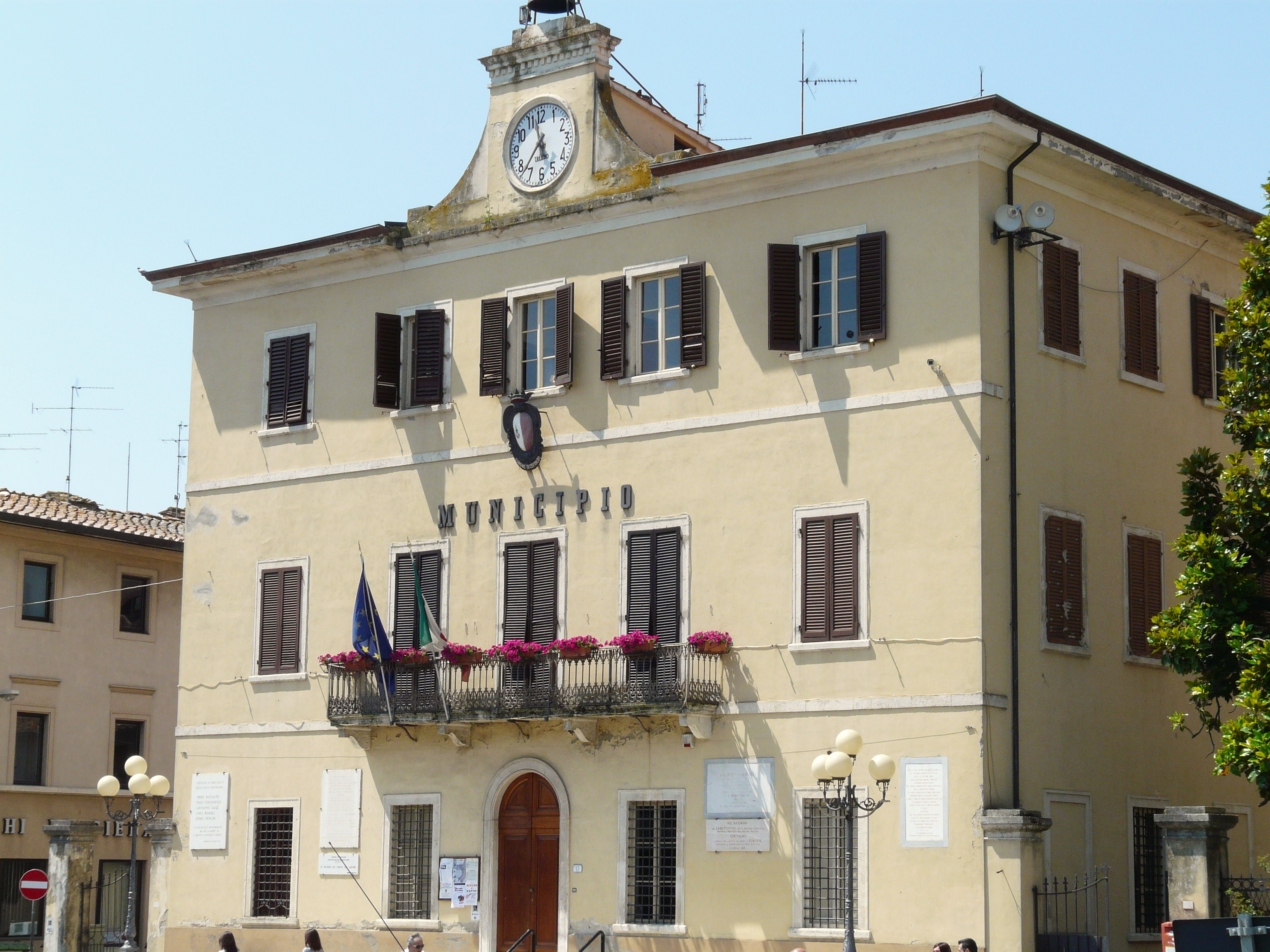 Municipio, Piazza Boccaccio, Certaldo, Toscana, Italia